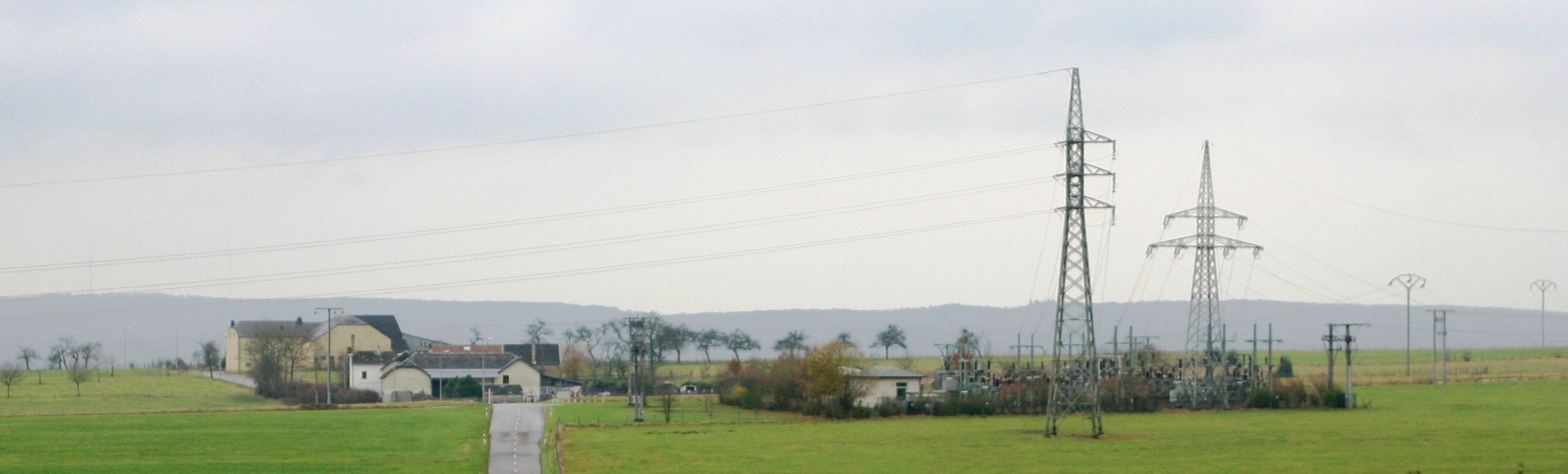 Freckeisen vun Norden gesinn. Kategorie:Gemeng Waldbëlleg